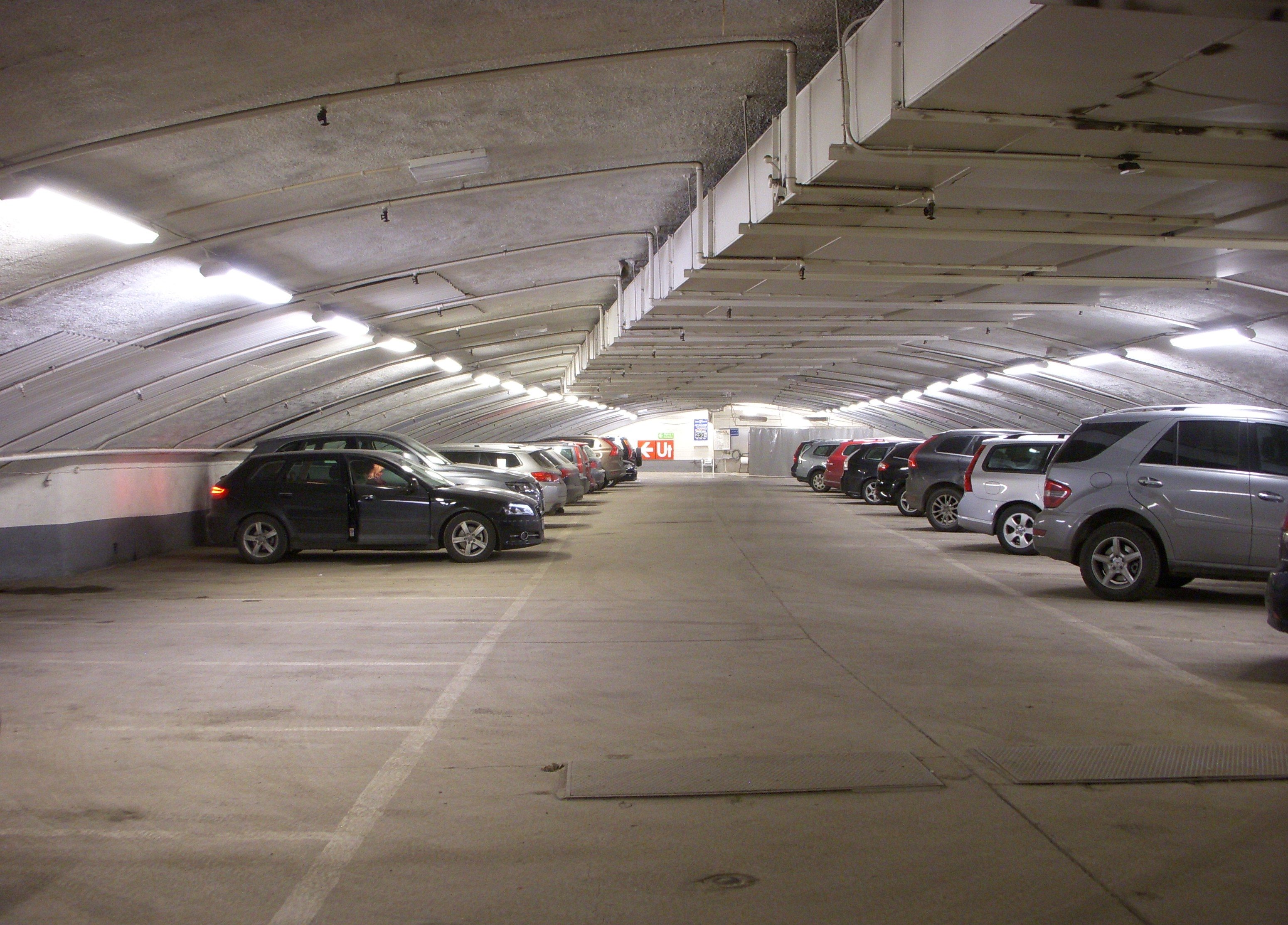 Övre planet i Klara skyddsrum